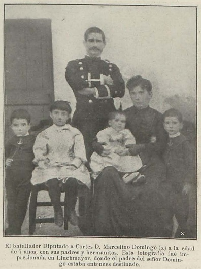 El batallador Diputado a Cortes. D. Marcelino domingo (X) a la edad de 7 años, con sus padres y hermanitos. Esta fotografía fue impresionada en Lluchmayor, donde el padre del señor Domingo estaba entonces destinado.